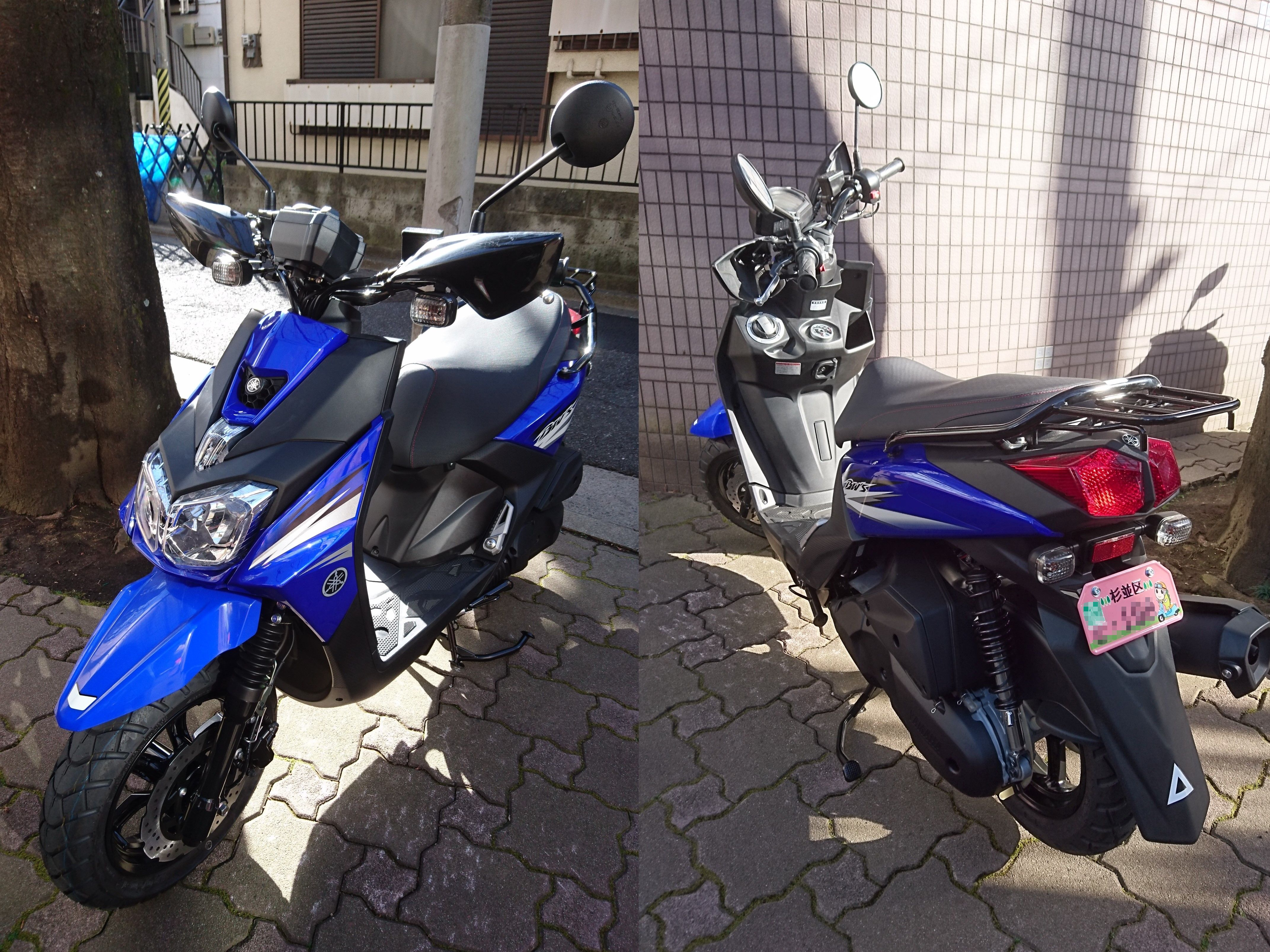 ヤマハ・BW'S125（日本仕様）のフロント、リヤ